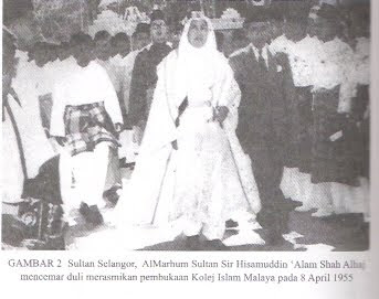 Perasmian Kolej Islam Malaya